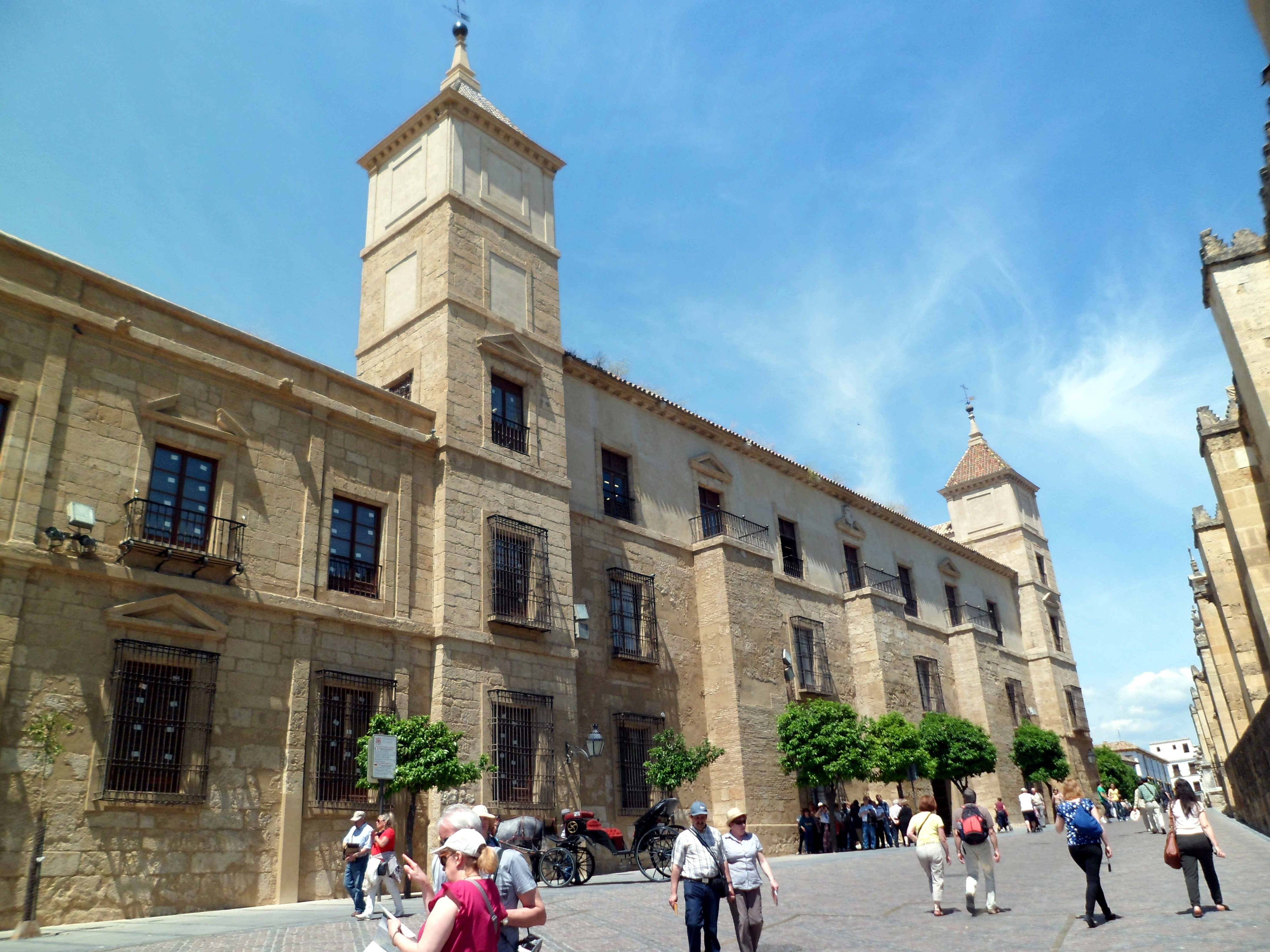 Palacio Episcopal de Córdoba (España).